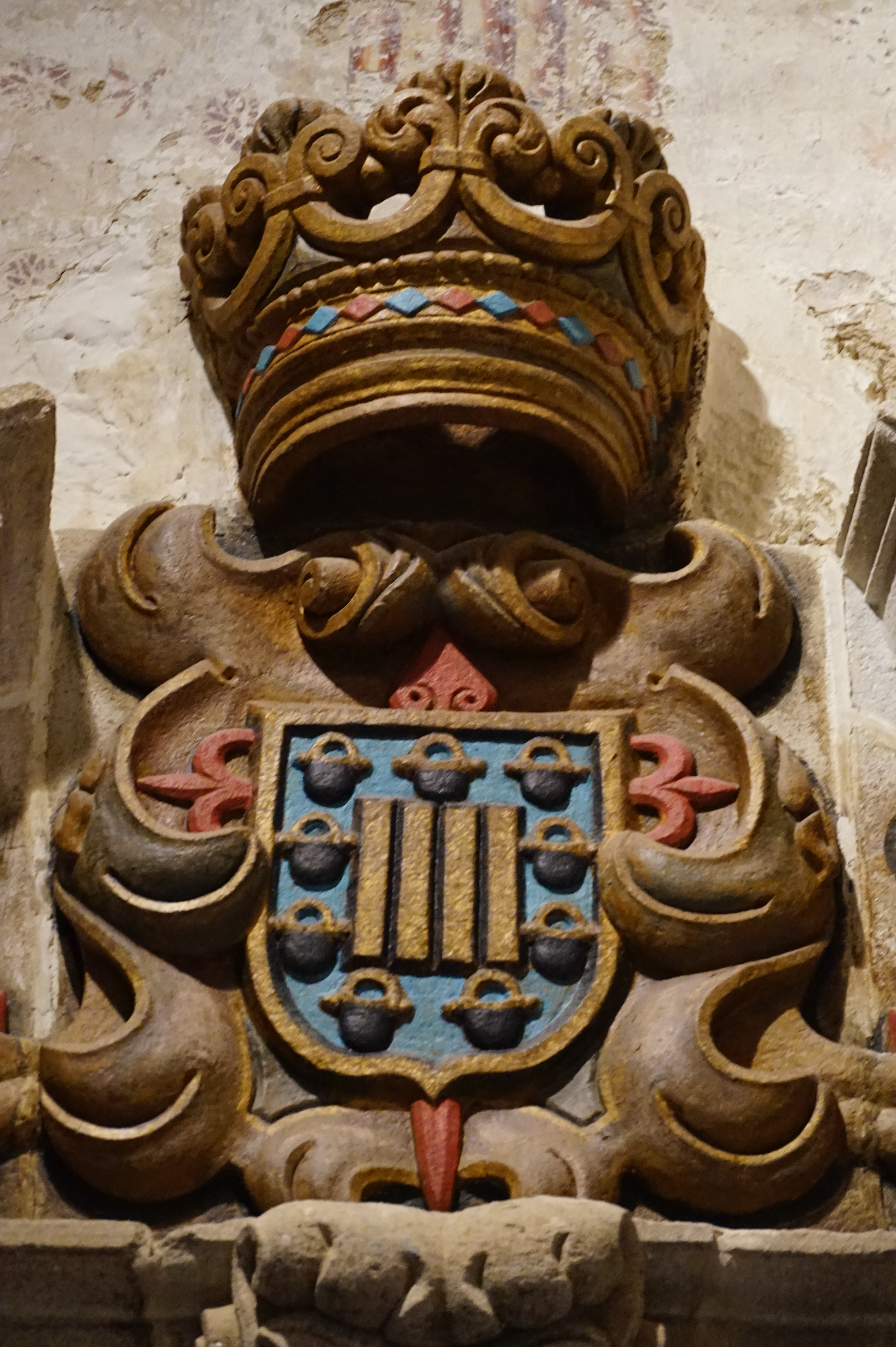 Escudo do Condado de Taboada no sepulcro de Xoán Taboada de Ribadeneira e Figueroa, na igrexa de San Pedro de Bembibre (Taboada, Galiza)